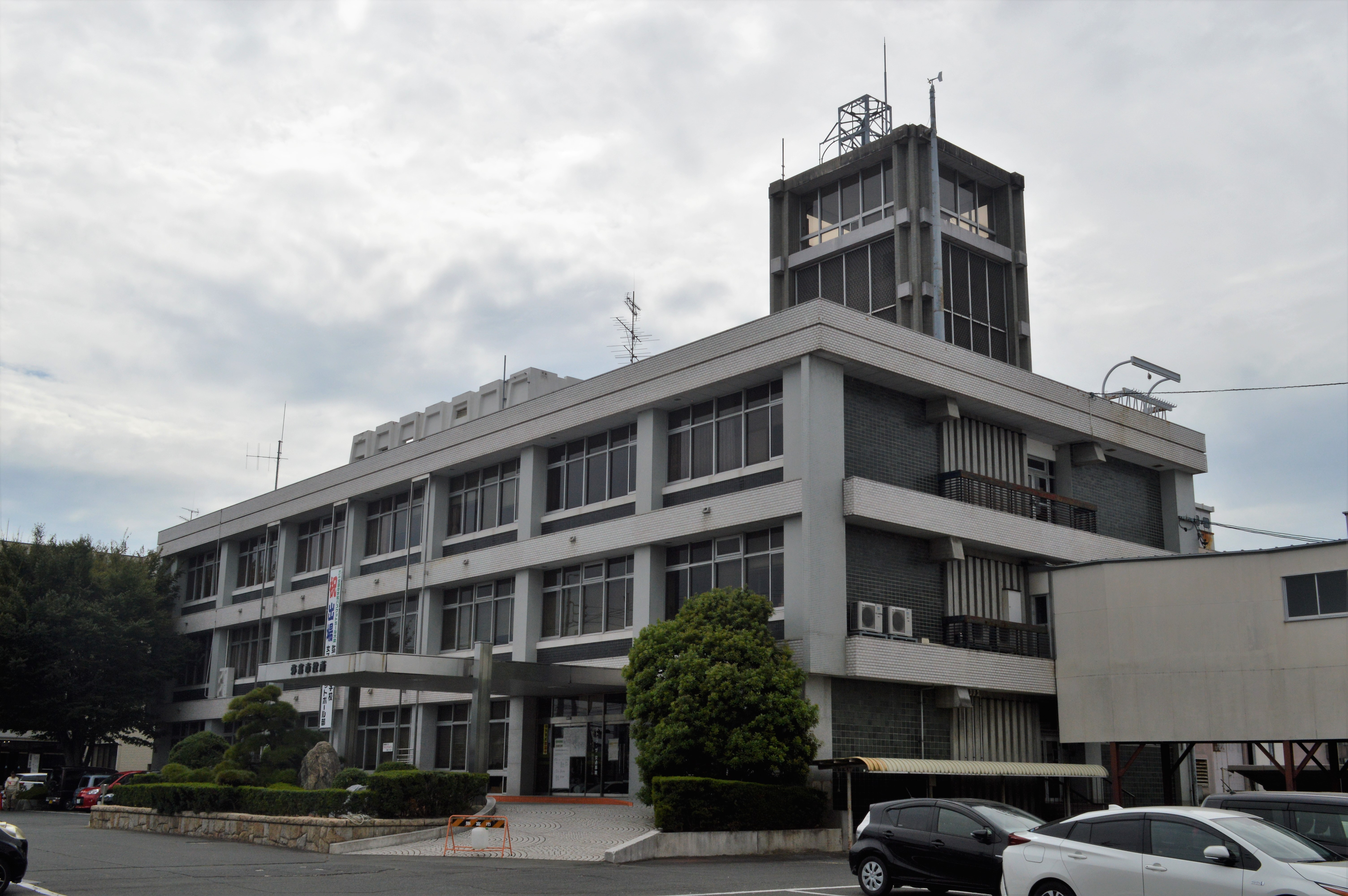 愛知県弥富市の弥富市役所。